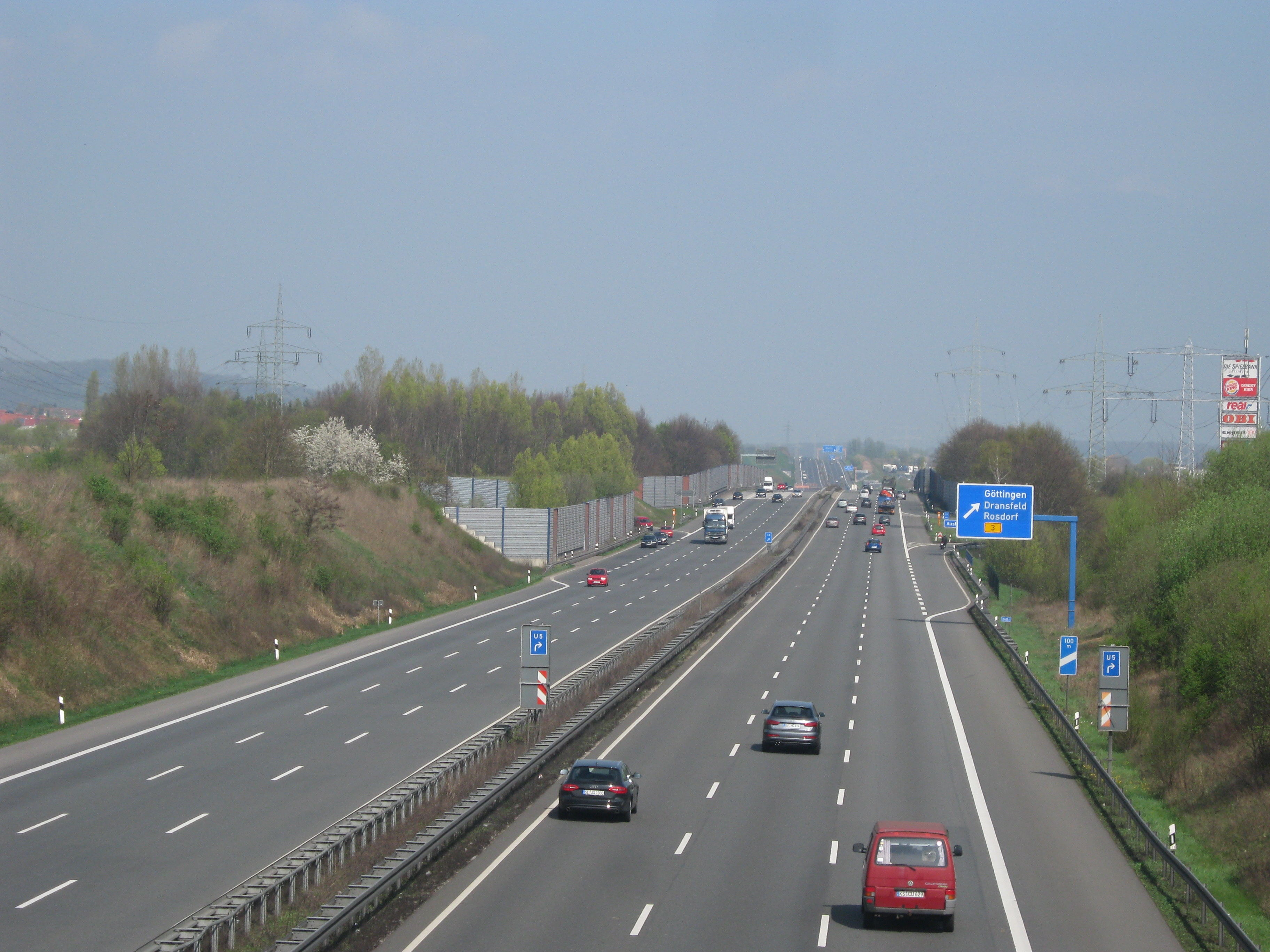 Blick auf die A7 nach Norden von der Brücke der Dransfelder Rampe, dem stillgelegten Abschnitt Göttingen - Hann. Münden über Dransfeld der Hannöverschen Südbahn.